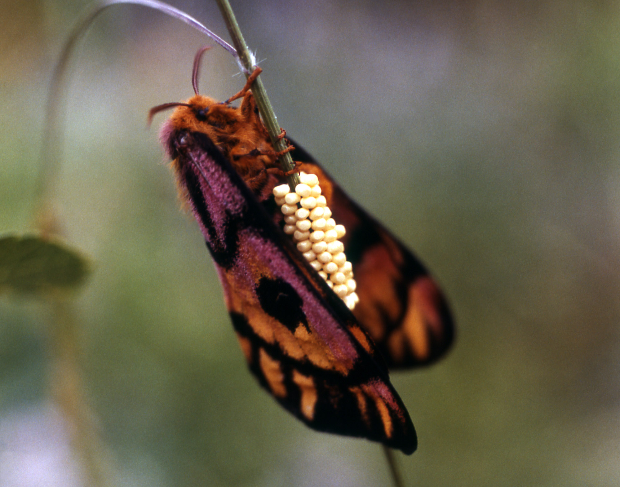 Hemileuca eglanterina laying eggs